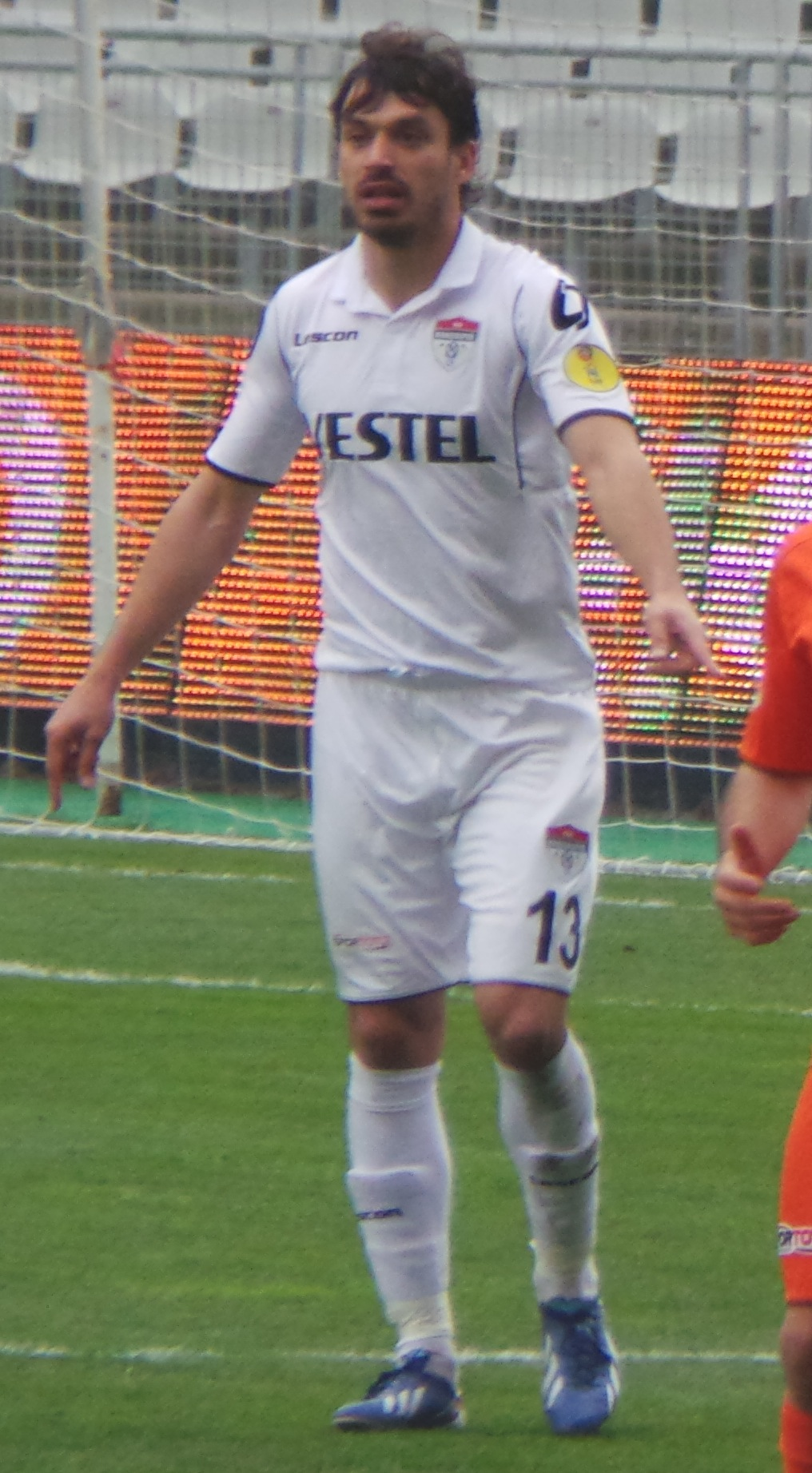 Nikola Mikić